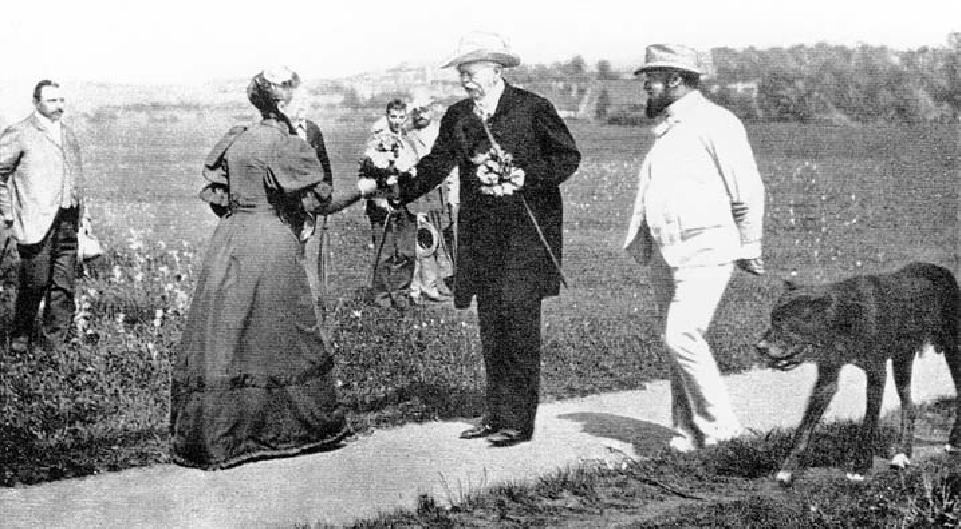 Otto von Bismarck als Spaziergänger in Bad Kissingen mit seiner Dogge Tyras und seinem Leibarzt Dr. Ernst Schweninger August 1893